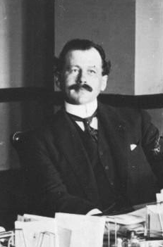 Adélard Turgeon, circa 1905.